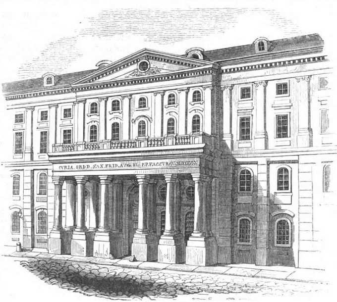 Das Landhaus in Dresden an der Landhausstraße, 1831 - 1907 Sitz des Landtages / der Ständeversammlung